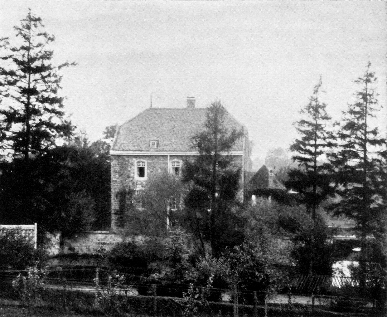 Das Vlattenhaus in Raeren-Eynatten, Belgien